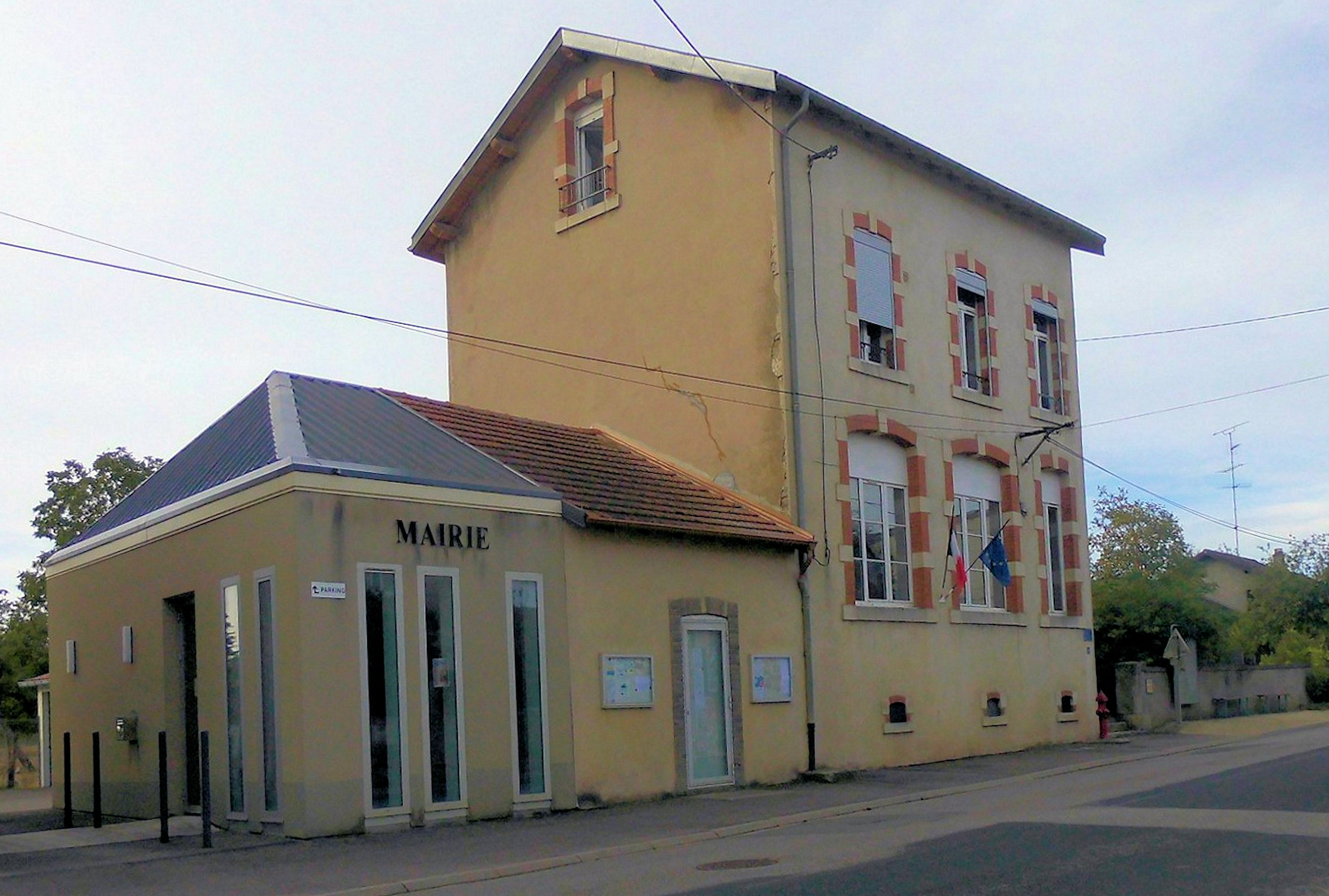 La mairie d'Ognéville